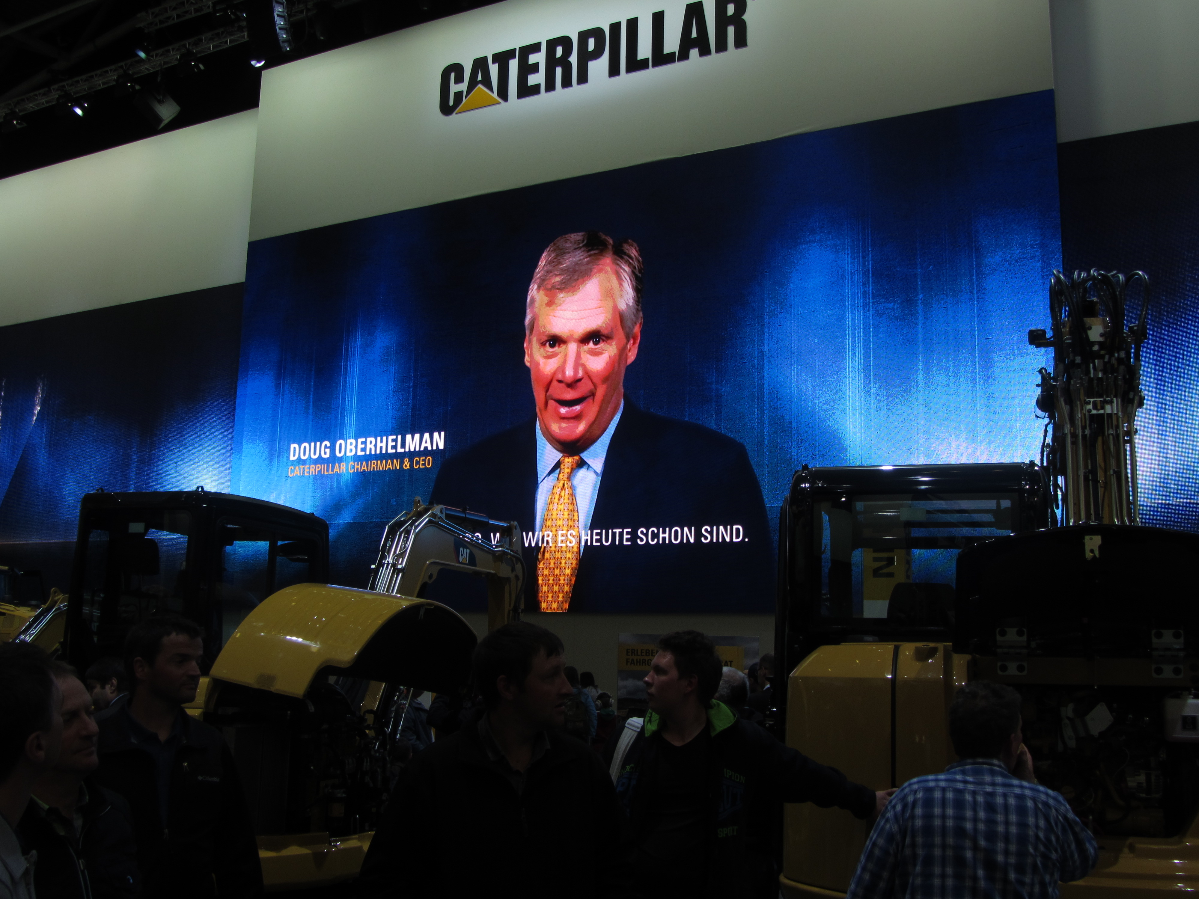 Douglas R. Oberhelman (CEO) - Multifunktionsleinwand auf der Bauma 2016 in der Caterpillar-Halle